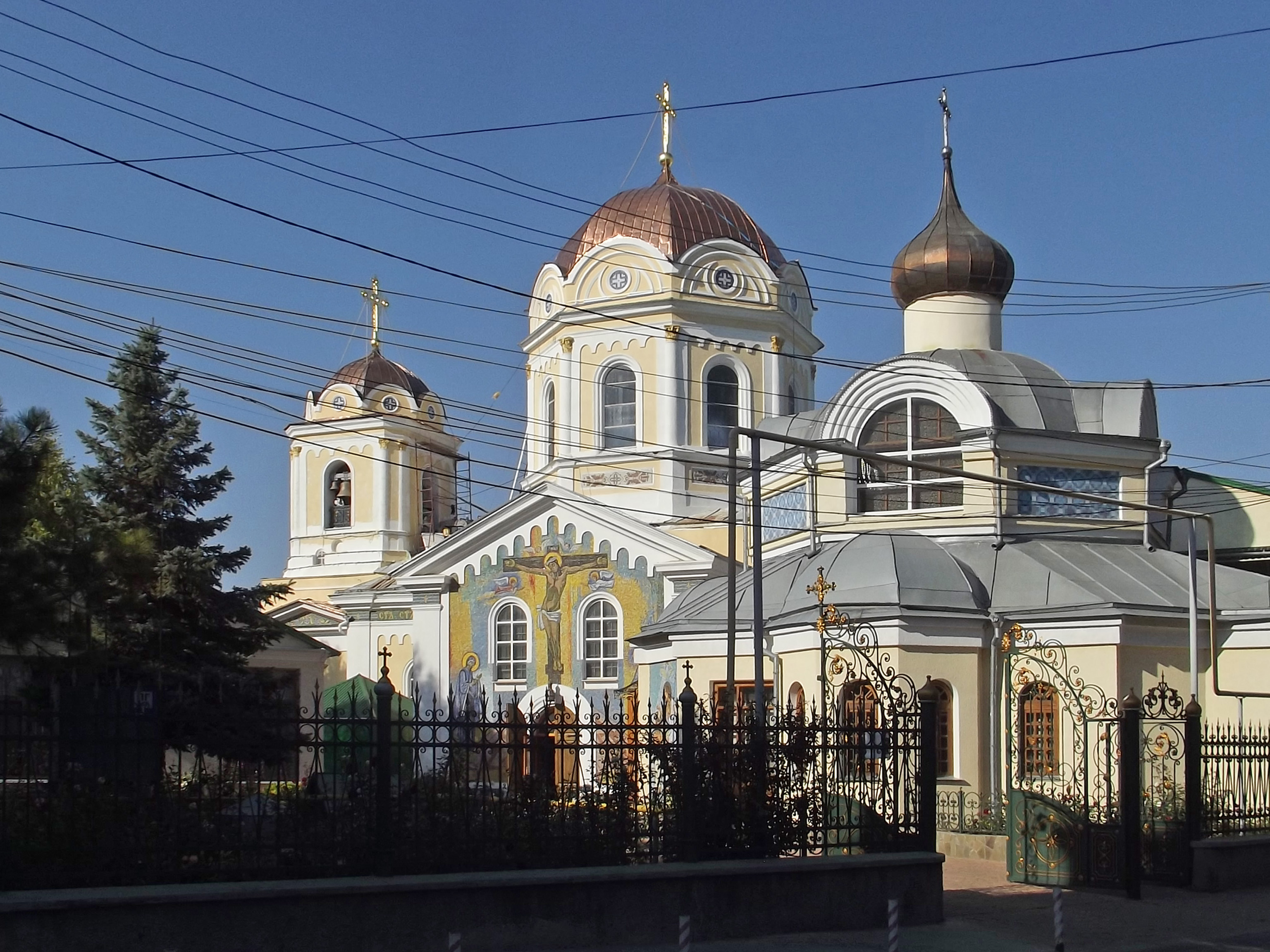 Свято-Троицкий монастырь